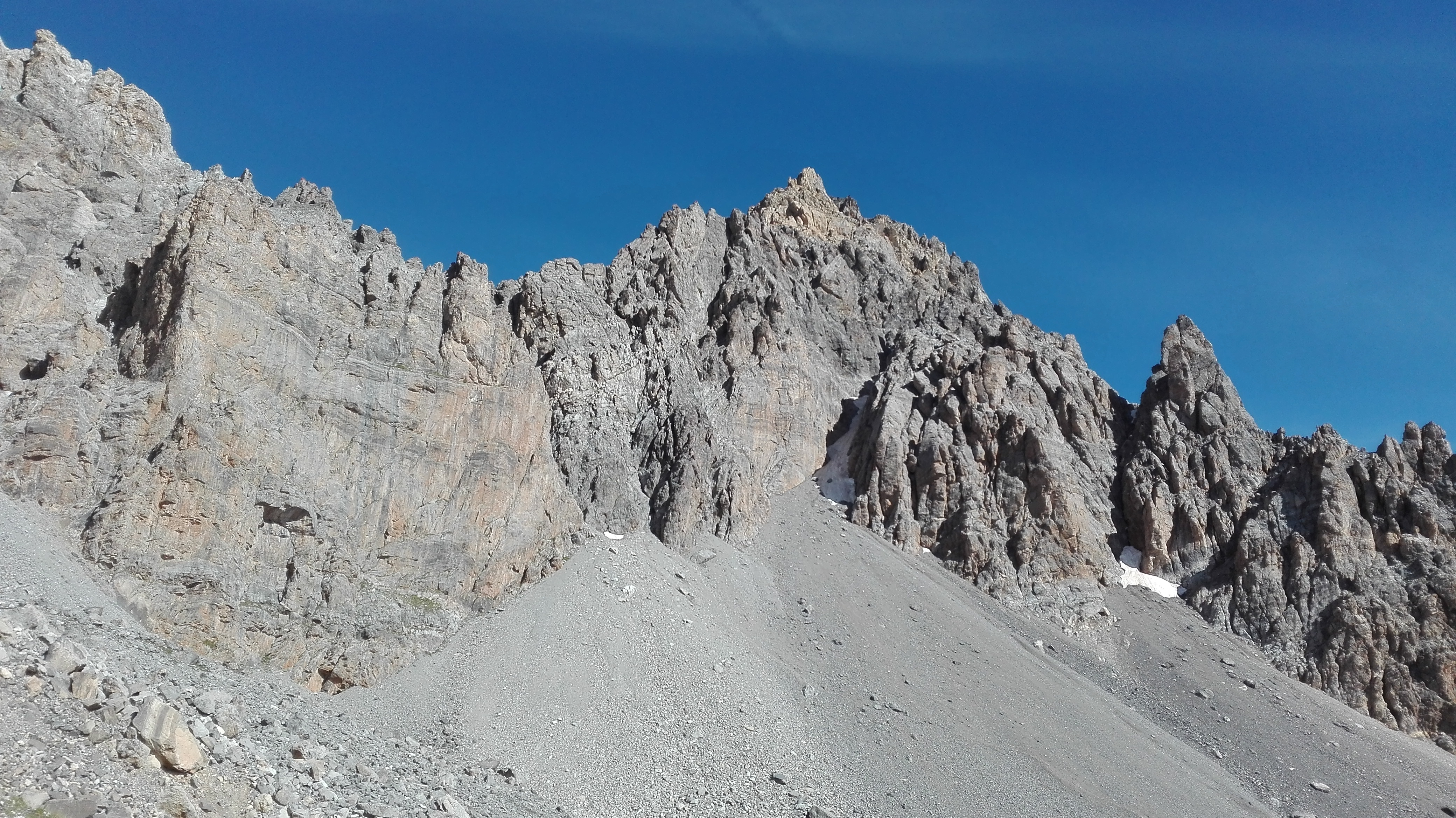 Il versante italiano della montagna. Si intravvede il canalino che sale al bivacco Renato Montaldo al Buc di Nubiera.